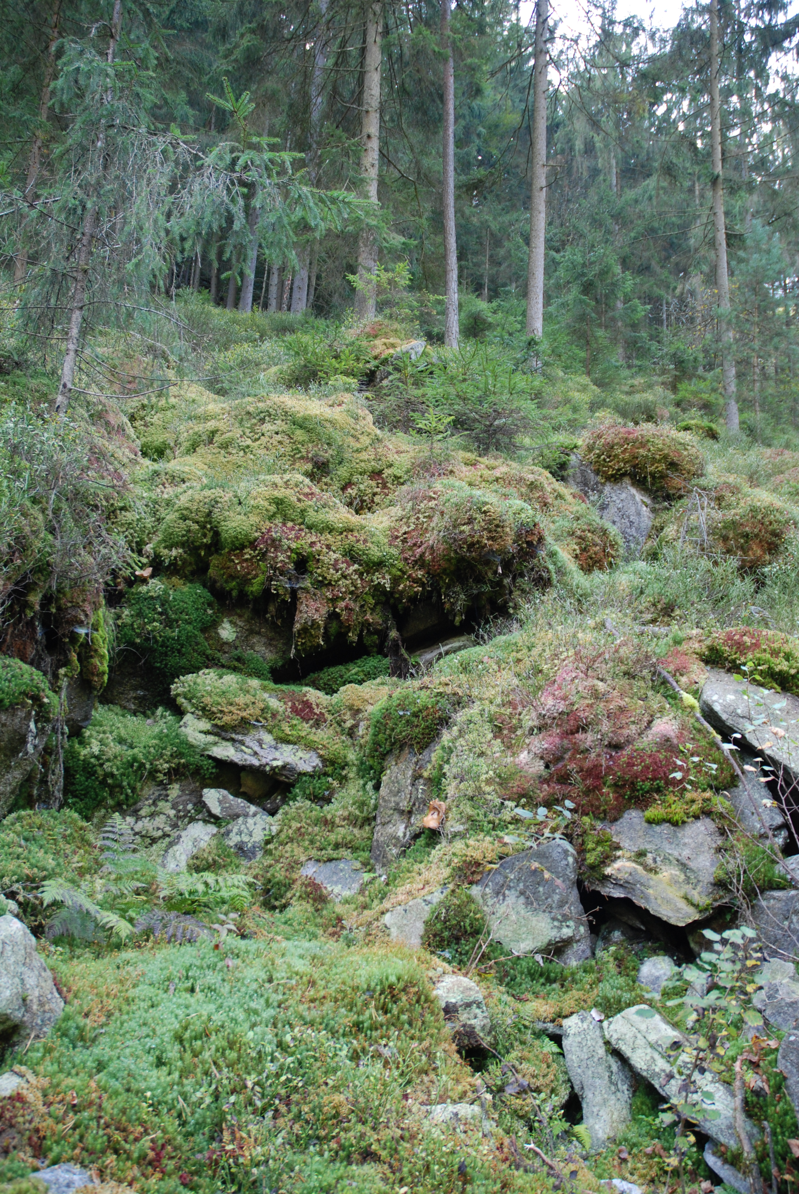 Vermoorte Blockhalde ("Kondenswassermoor") im Naturschutzgebiet Rannatal (n108), Neustift im Mühlkreis, Pfarrkirchen im Mühlkreis This media shows the nature reserve in Upper Austria with the ID n108.